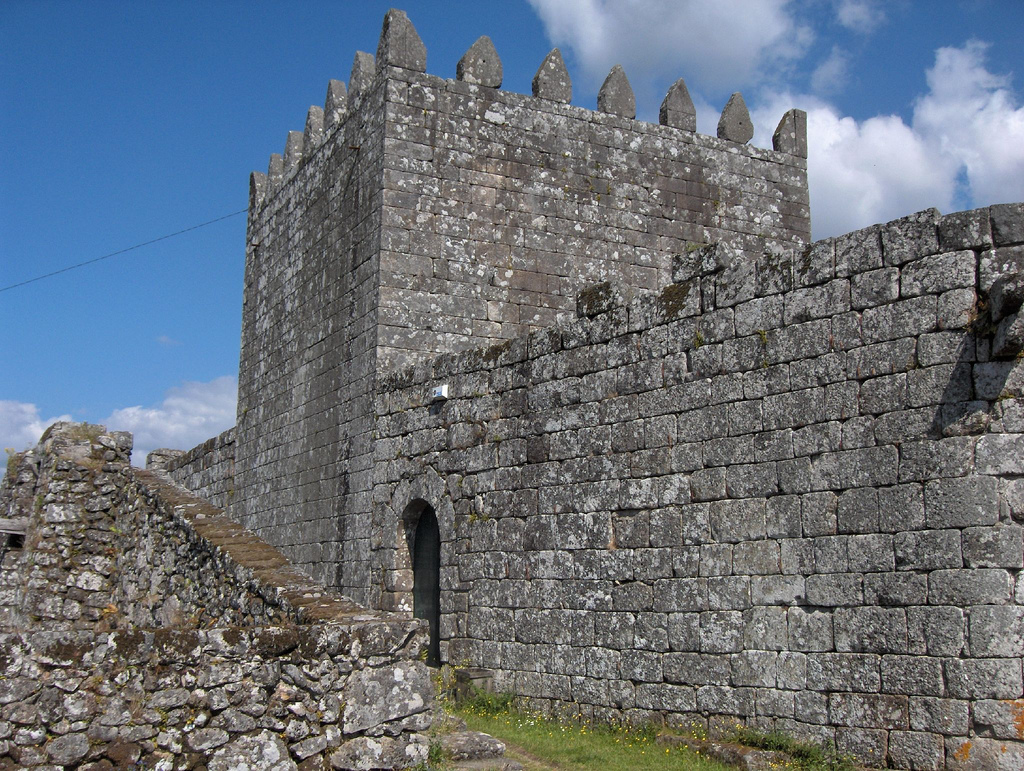 Lindoso Castle, Portugal